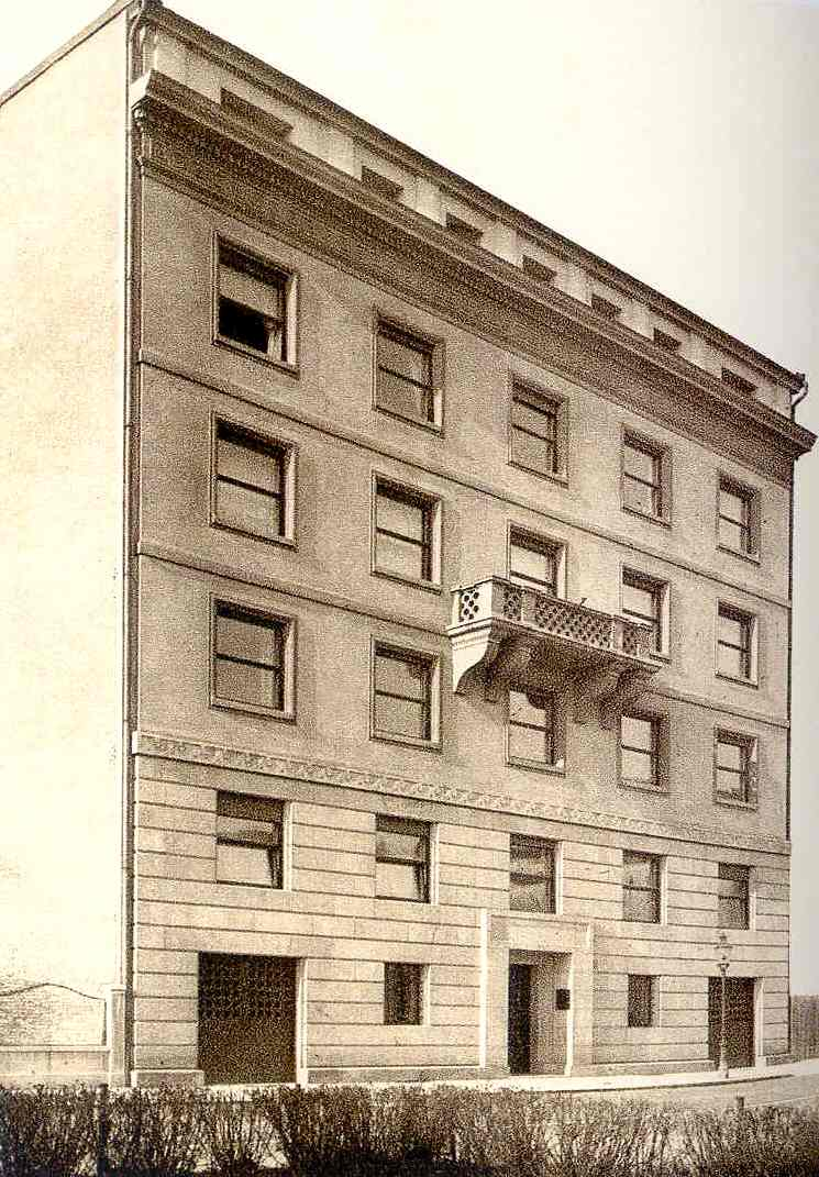 Viktor Kovačić- Palača Slaveks, Svačićev trg 13, Zagreb, 1920.